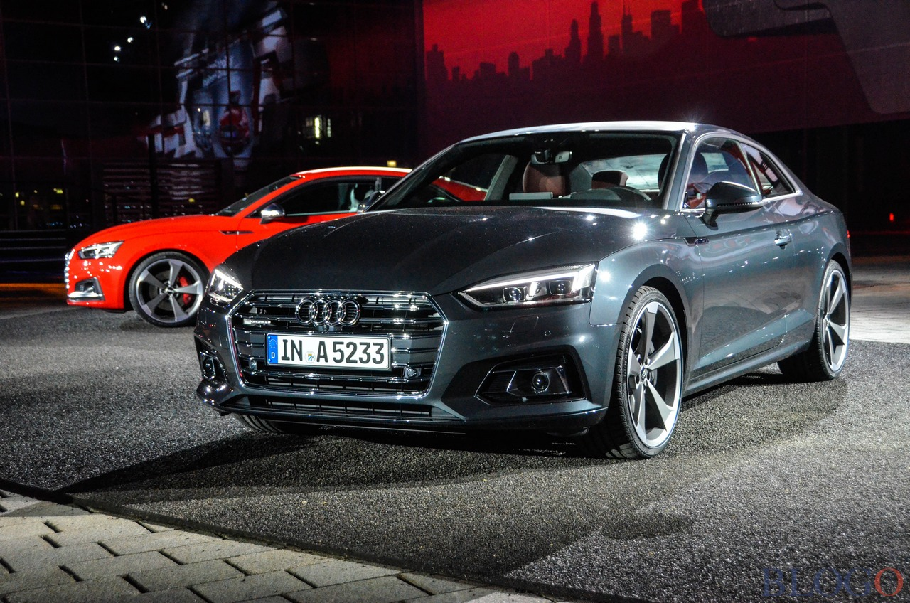 Audi a5 seconda generazione